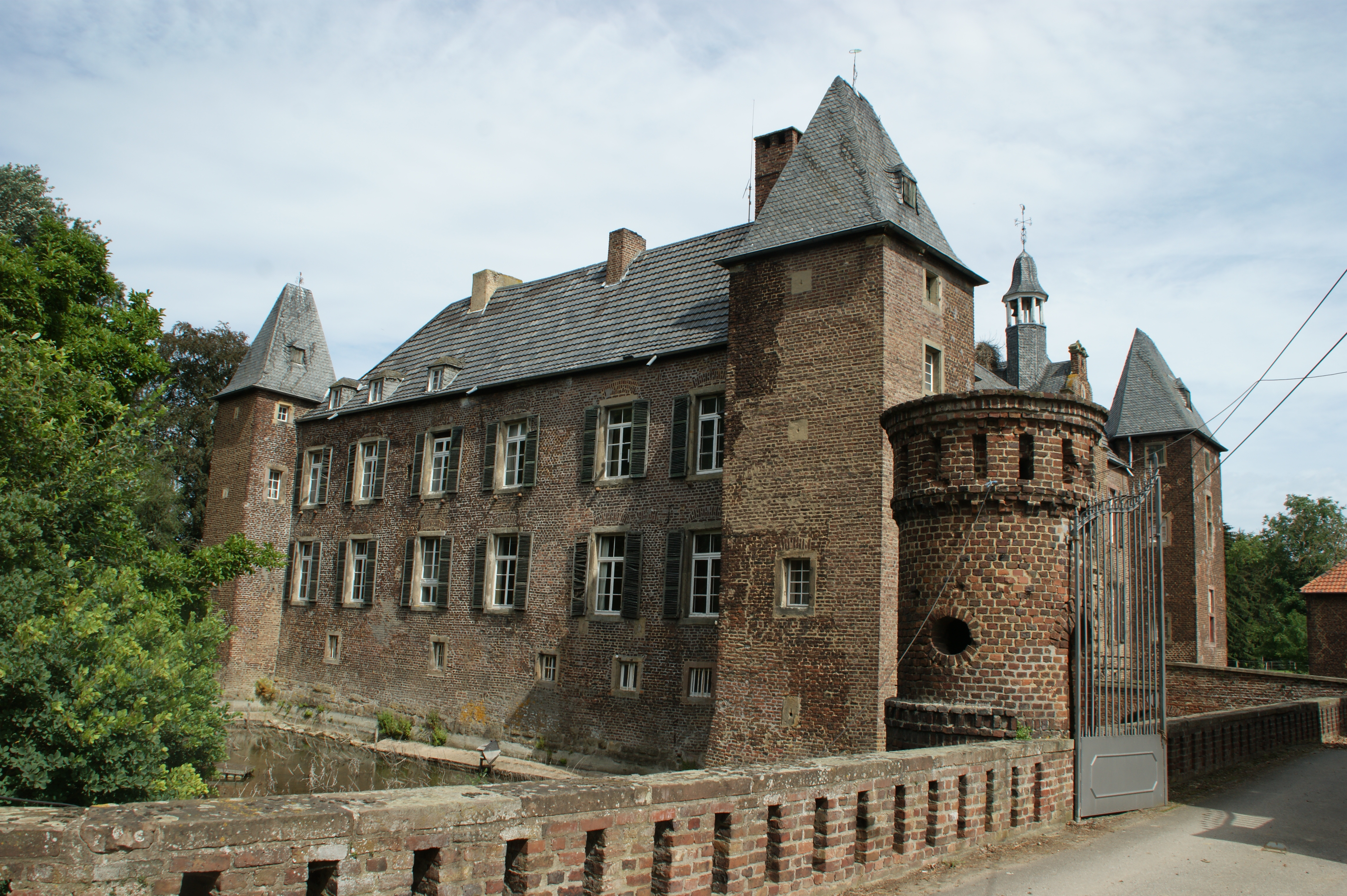 Denkmal Haus Rath nahe Arnoldsweiler